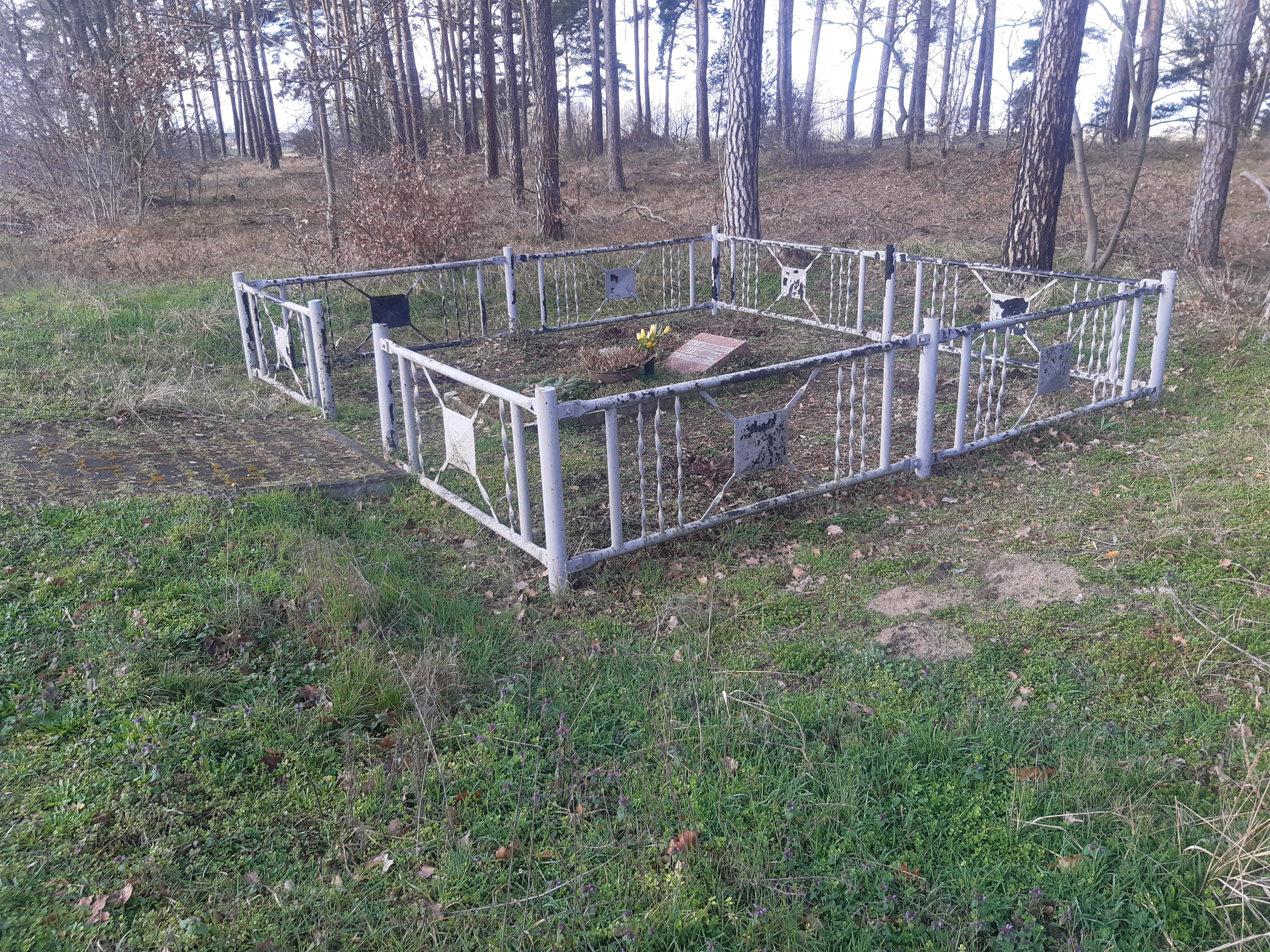 Gedenkstätte